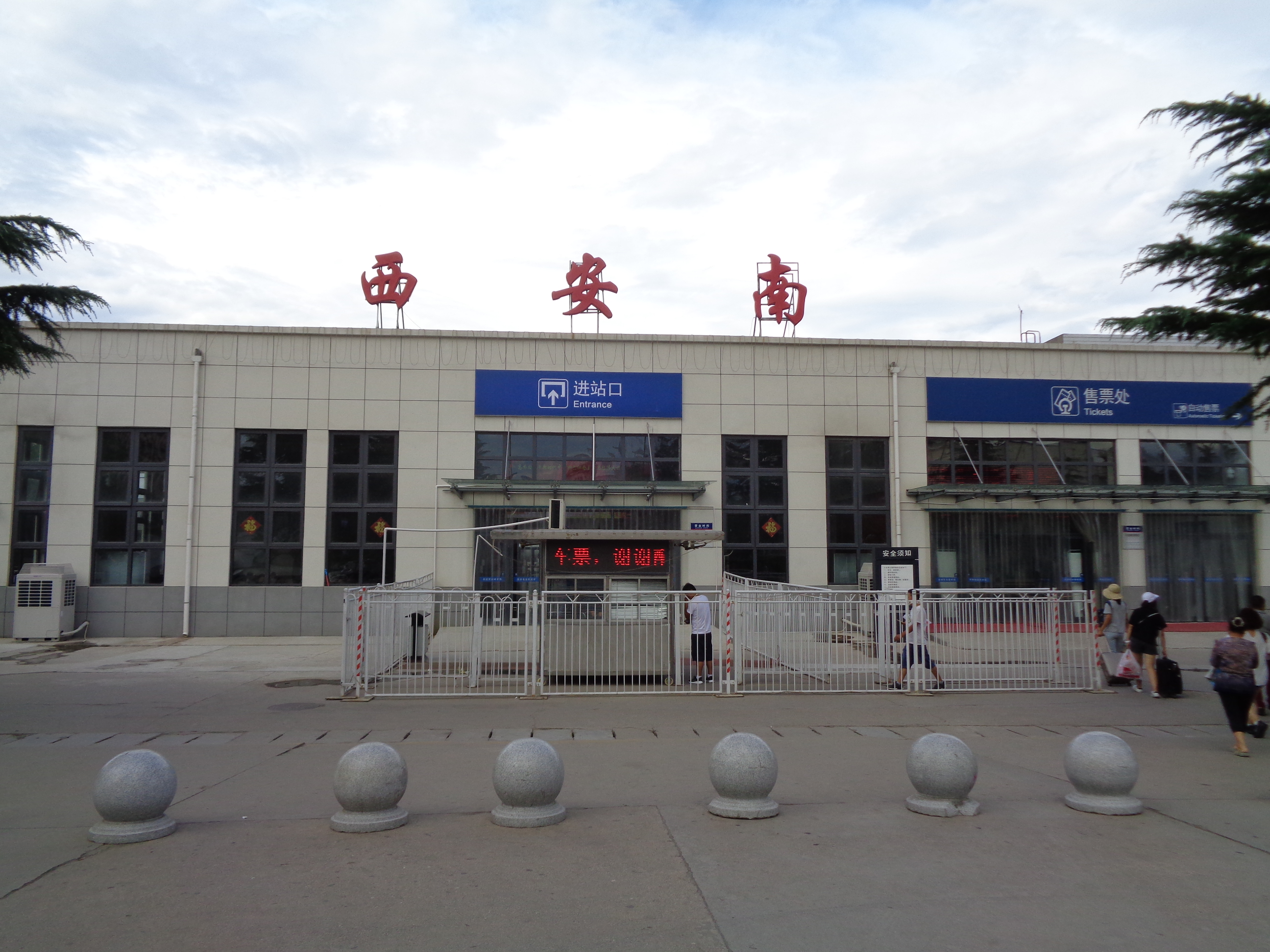 西安市长安区引镇街道西安南站实景